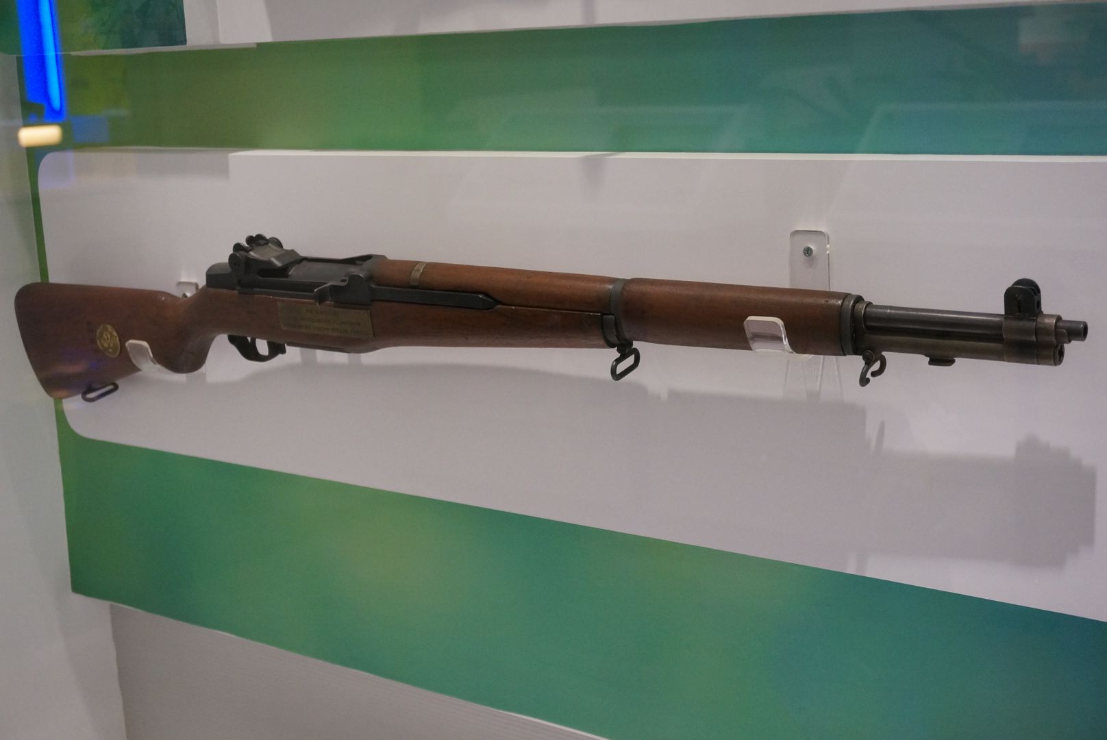 M1格蘭德式步槍。